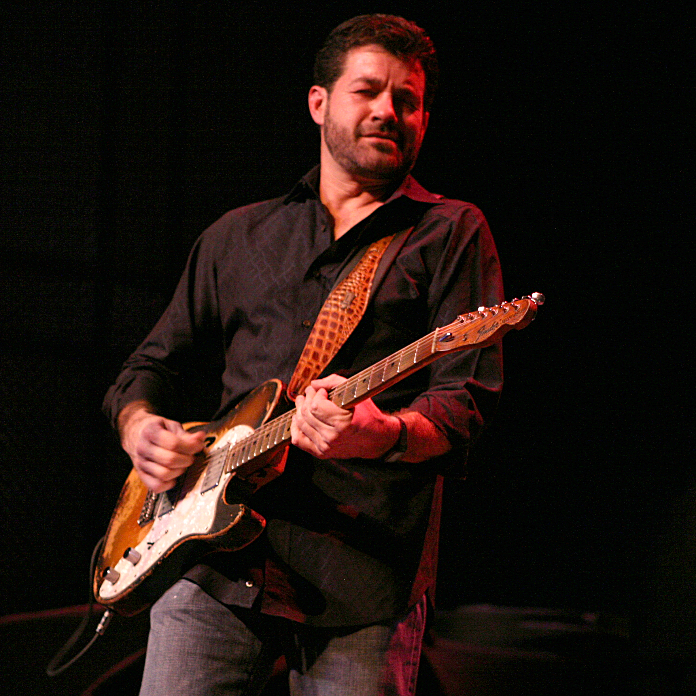 Tab Benoit